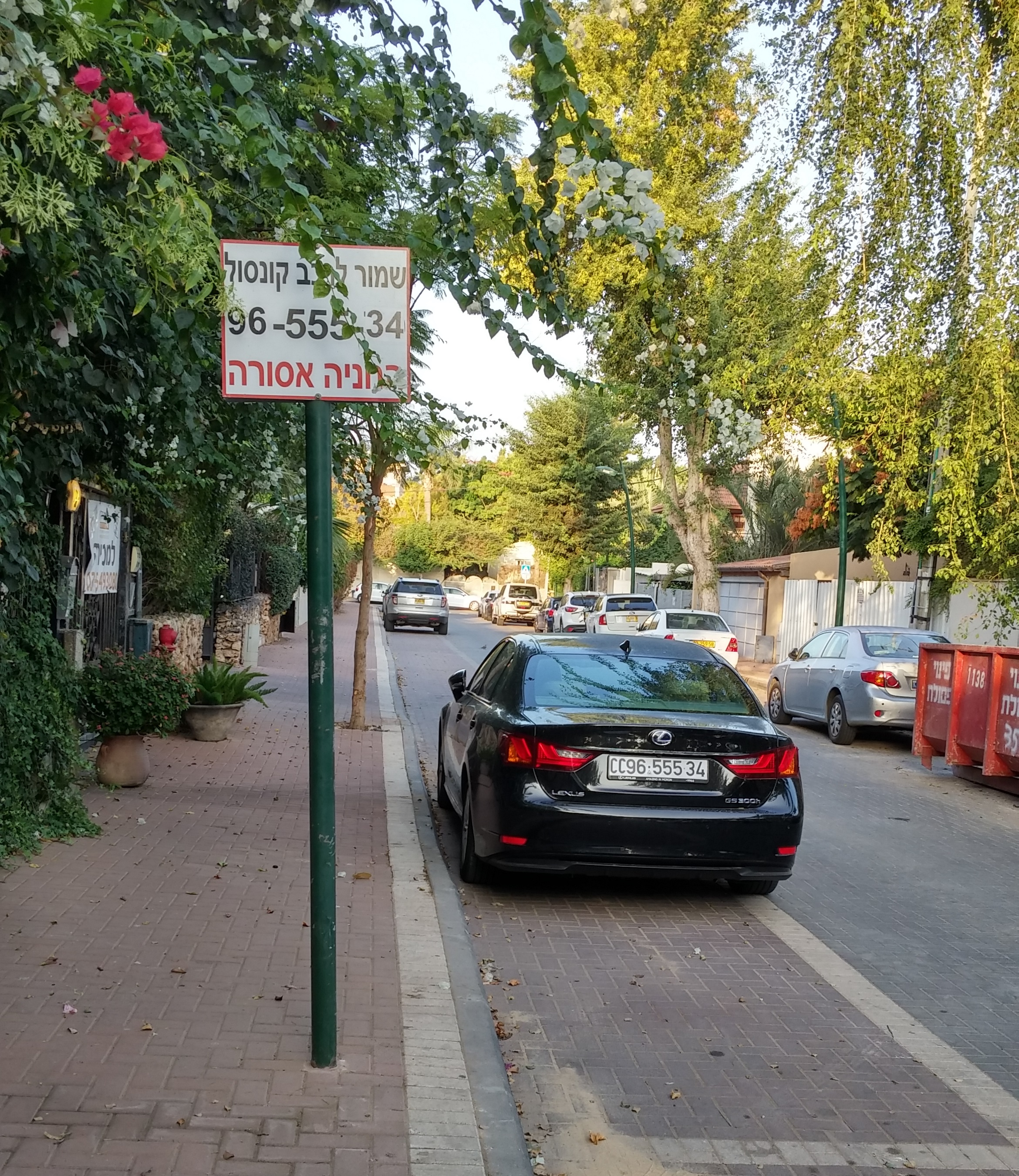 חניה שמורה לקונסול כבוד ברמת השרון